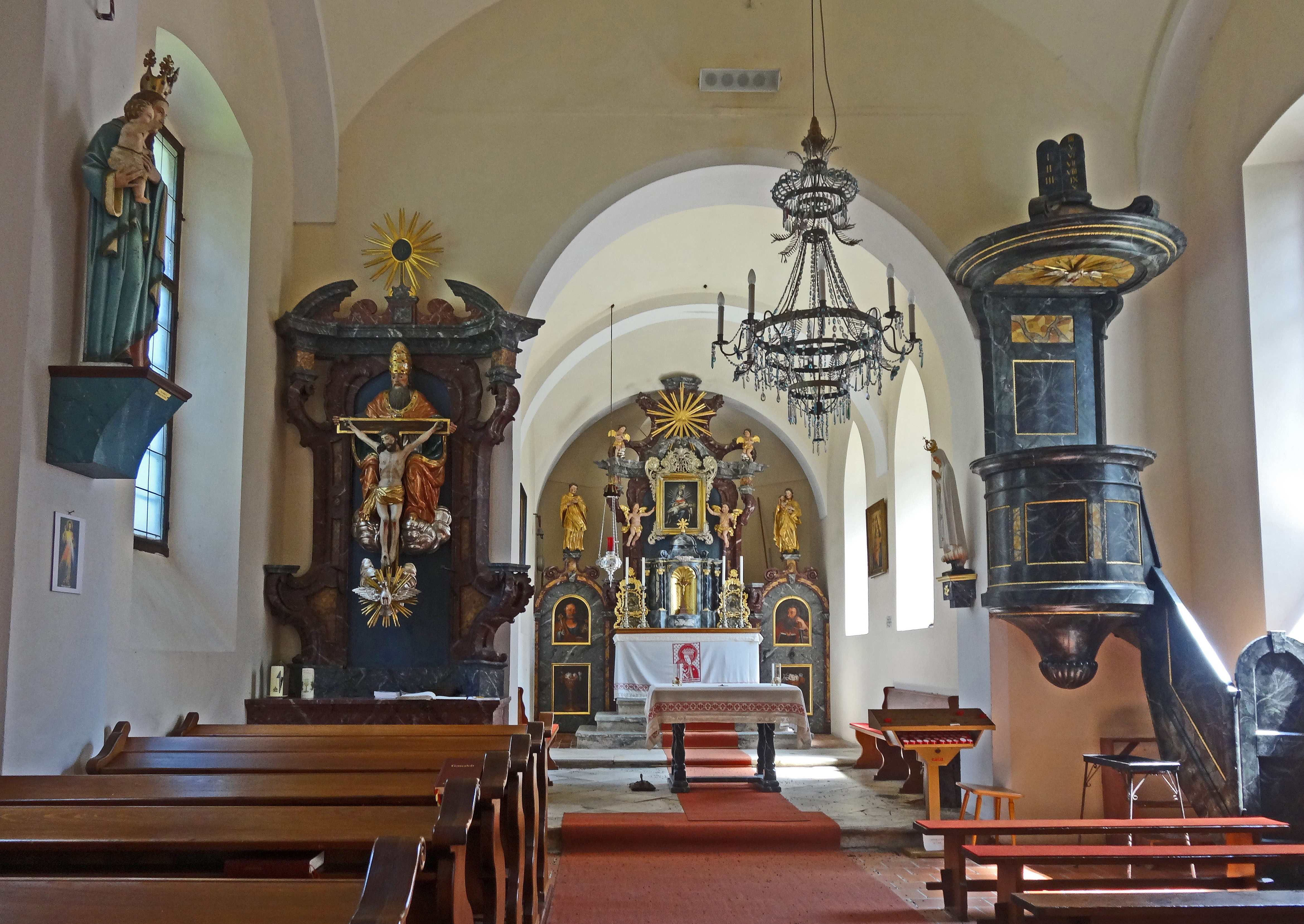 Kath. Filialkirche, Wallfahrtskirche Maria Sieben Schmerzen, Innenansicht